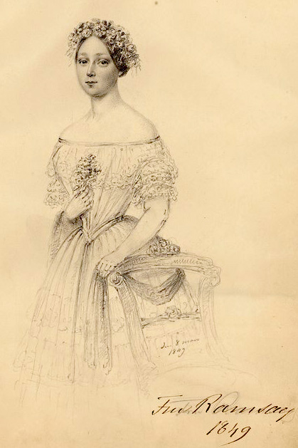 Ebba Ramsay porträtterad av Maria Röhl, avfotograferad bild från Allhems Svenskt konstnärslexikon.